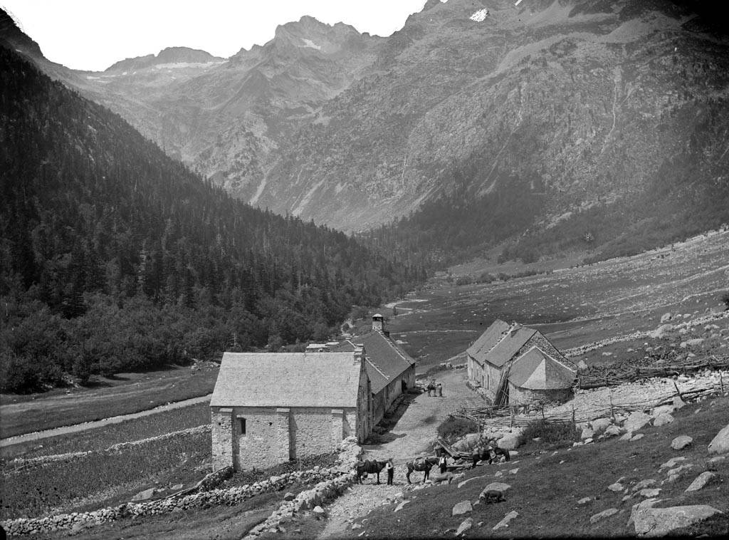 Imatge